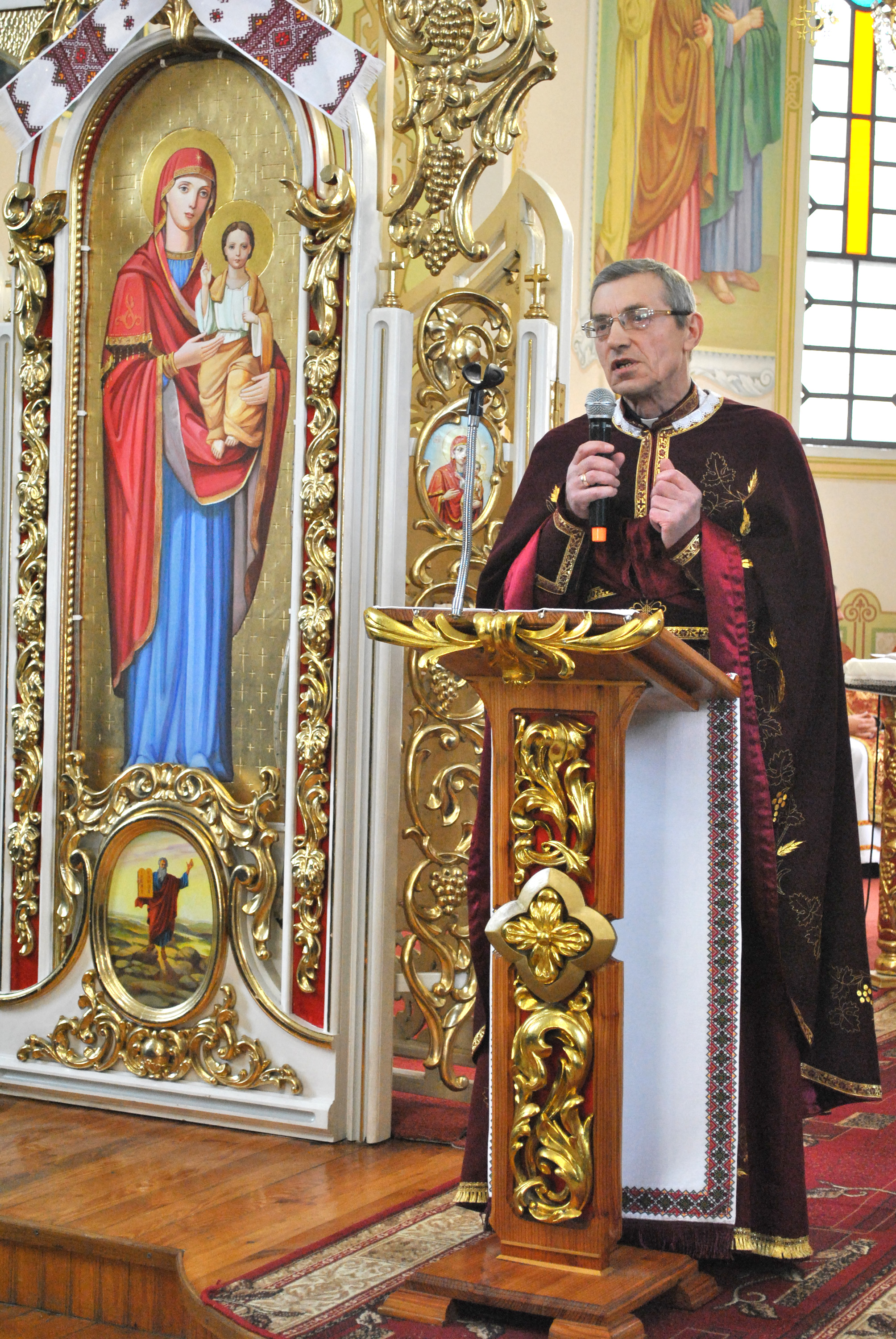 Панахида за героєм-«кіборгом», військовослужбовцем 80-ї окремої аеромобільної бригади Іваном Вітишином у святого Володимира УГКЦ смт Велика Березовиця Тернопільського району Тернопільської області. Проповідь о. Ореста Глубіша.